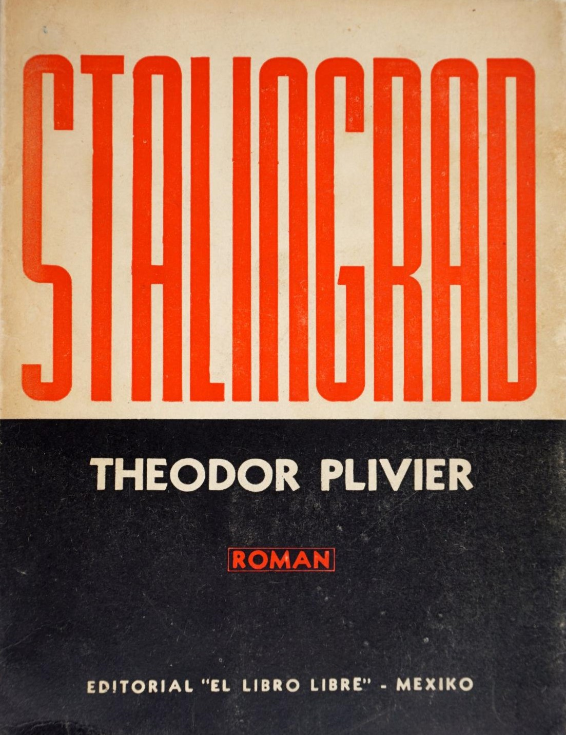 Theodor Plivier:Stalingrad, Roman, 407 Seiten, Dritte Ausgabe, Mexiko, Editorial El Libro Libre 1946; basiert auf der Textfassung der Moskauer Ausgabe.